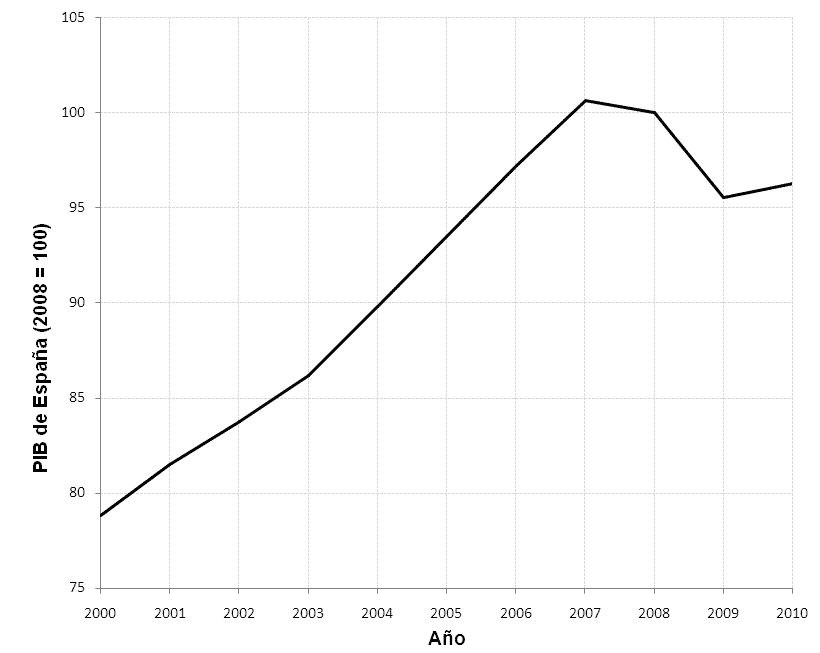 Evolución del PIB a precios de mercado en España (2000-2010). Fuente: INE: PIB a precios de mercado (Serie contable 2000-2010)